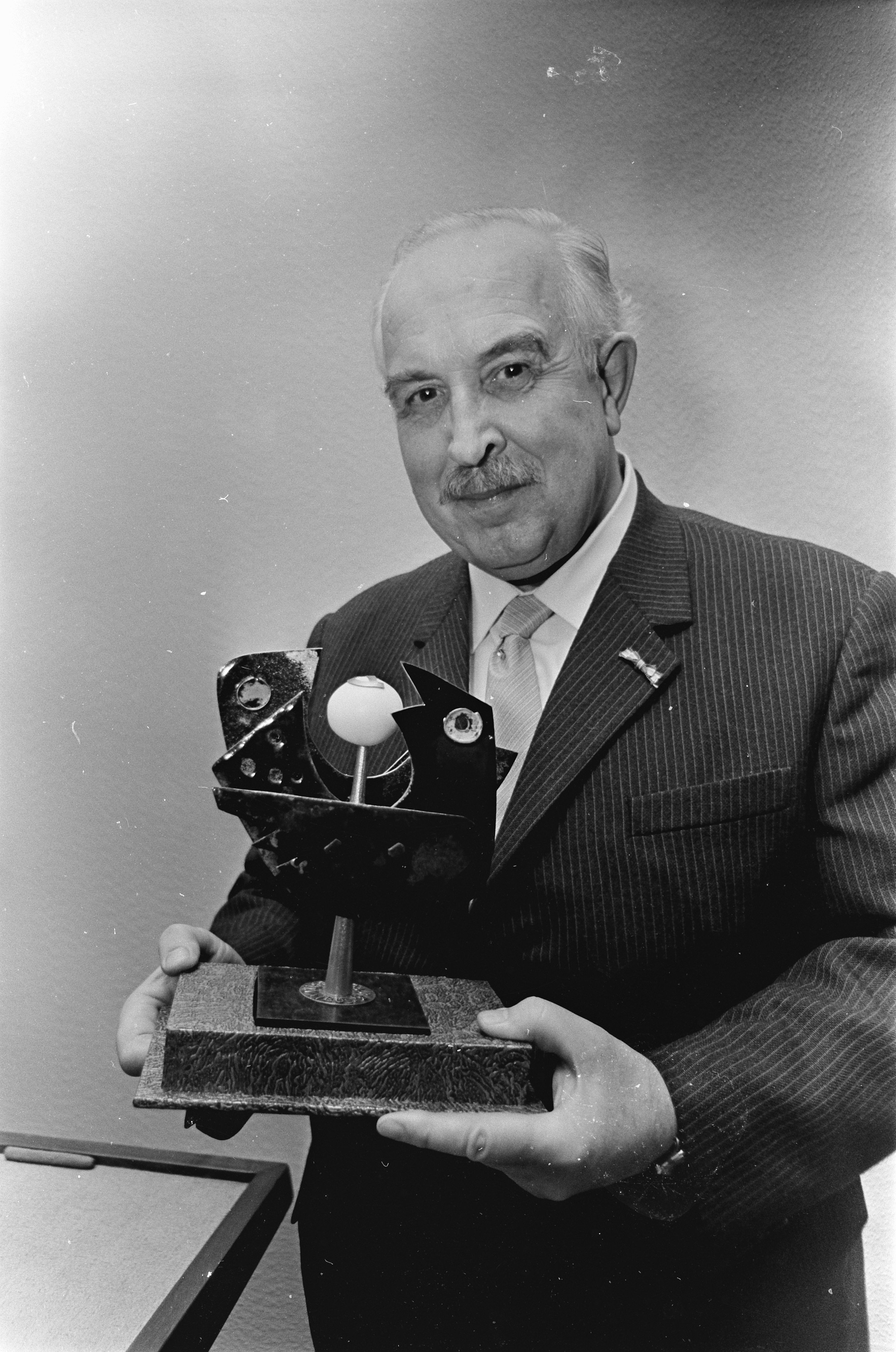 Collectie / Archief : Fotocollectie Anefo Reportage / Serie : [ onbekend ] Beschrijving : Gulden Letter voor acteur Hans Tiemeijer uitgereikt te Arnhem. Hier met prijs Datum : 27 november 1967 Locatie : Arnhem Trefwoorden : acteurs, prijzen, toneelspelers, uitreikingen Fotograaf : Nijs, Jac. de / Anefo Auteursrechthebbende : Nationaal Archief Materiaalsoort : Negatief (zwart/wit) Nummer archiefinventaris : bekijk toegang 2.24.01.05 Bestanddeelnummer : 920-8857